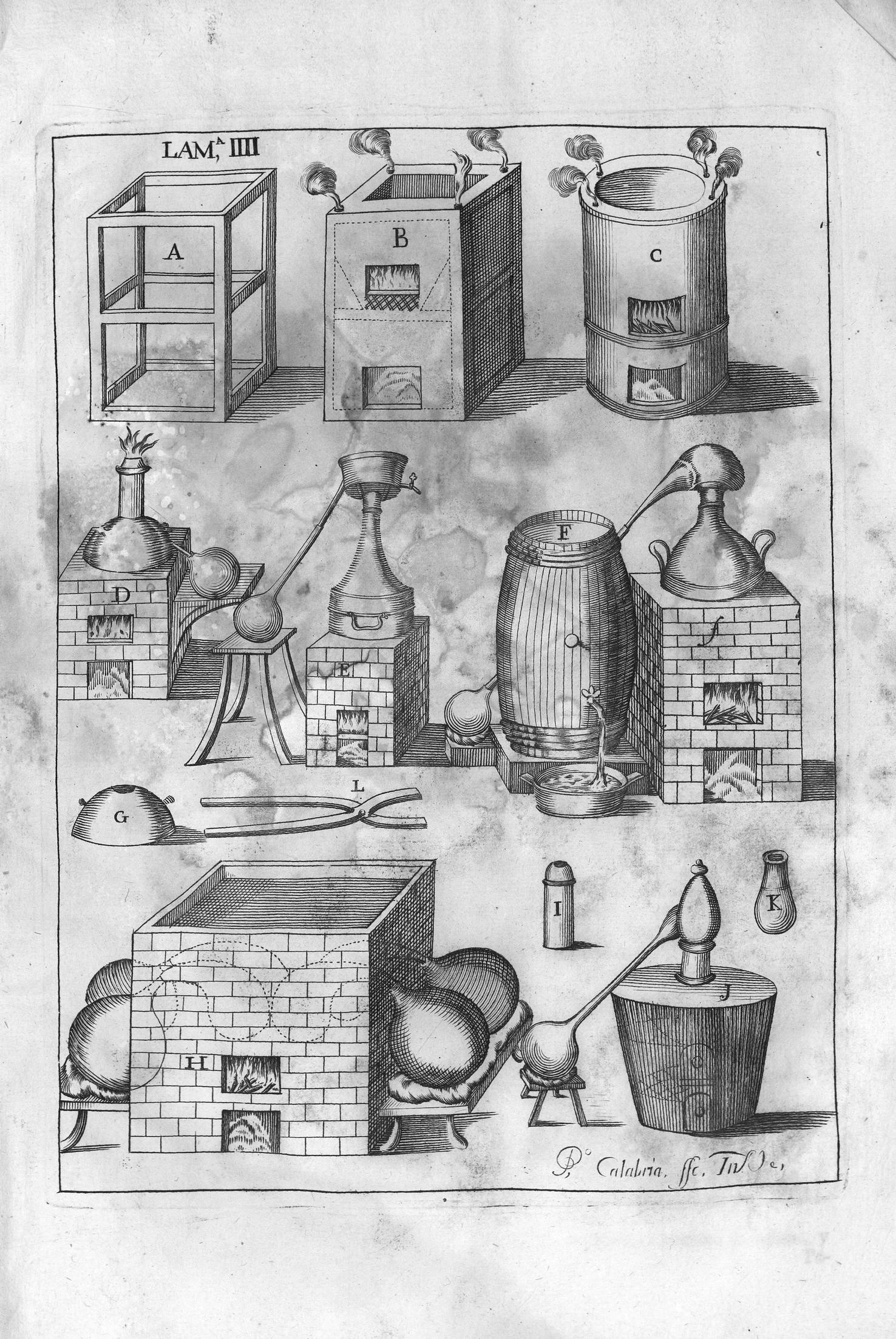 Félix Palacios, Palestra pharmaceútica, lámina IV, estampa calcográfica firmada Pº Calabria, F.